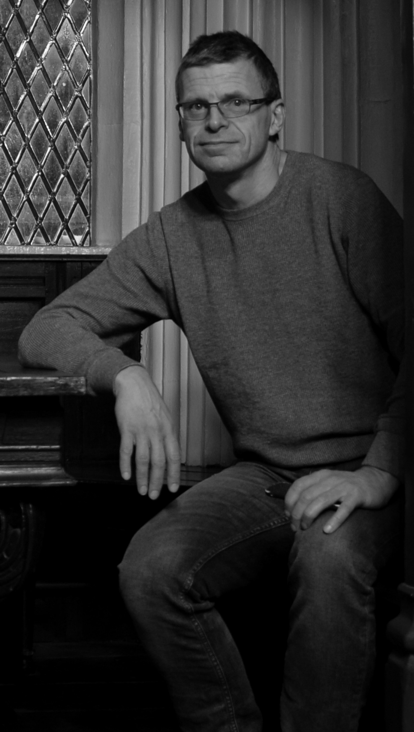 Prof. Dr. Thomas Kietzmann